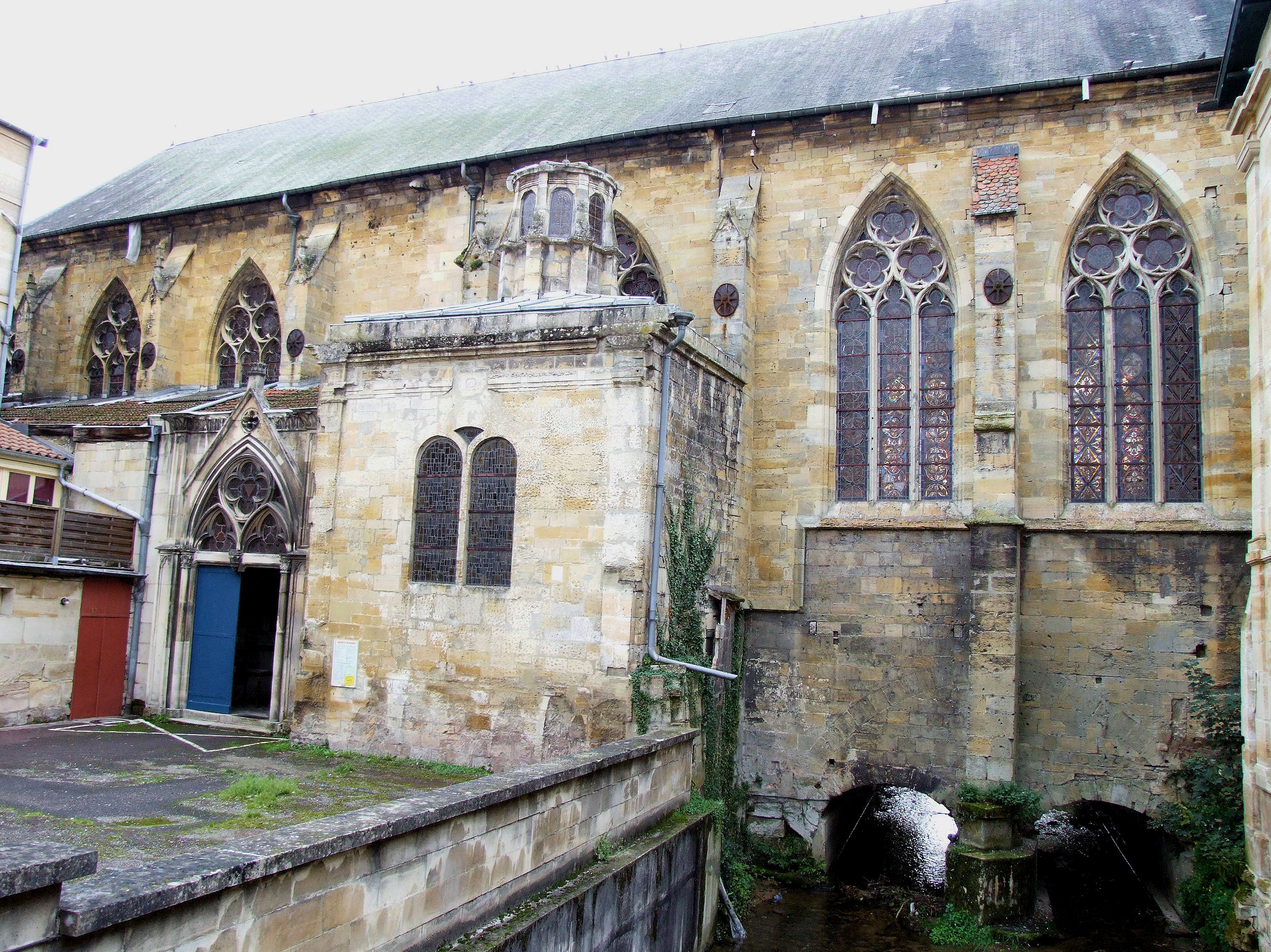 Bar-le-Duc - Eglise Saint-Antoine